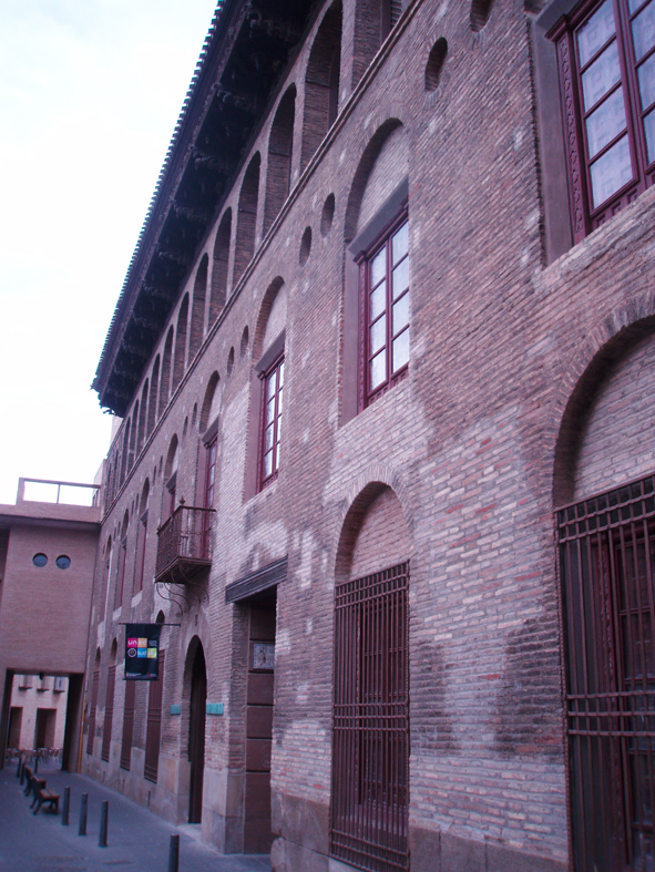 Palacio del Marqués de San Adrián de Tudela, en 2007